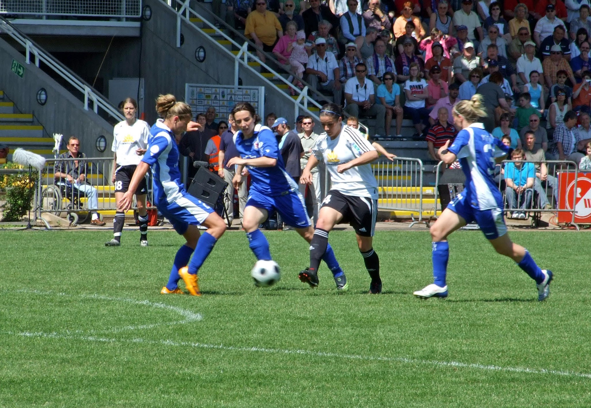 Alexandra Krieger vom 1.FFC Frankfurt, 2008